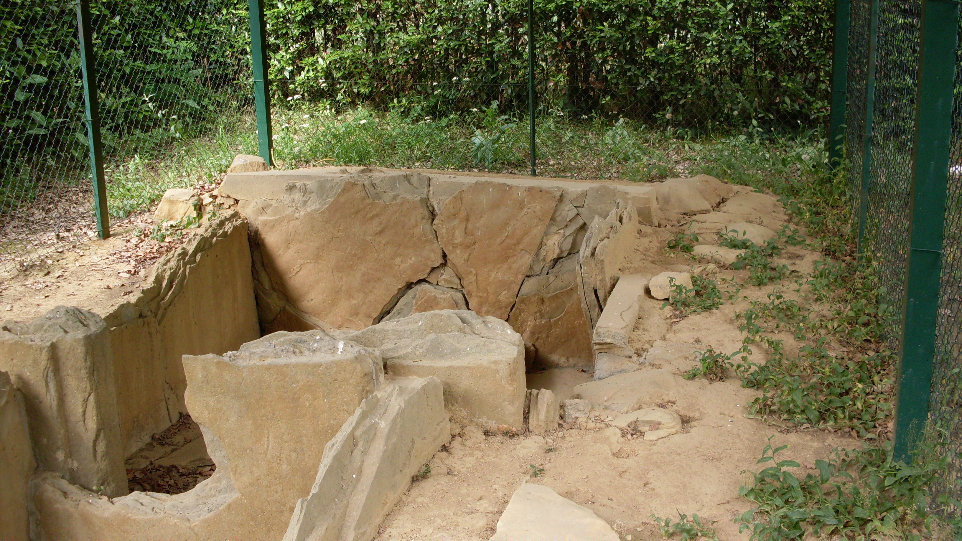 Tomba Etrusca al confina tra Signa (FI) e Carmignano(PO)